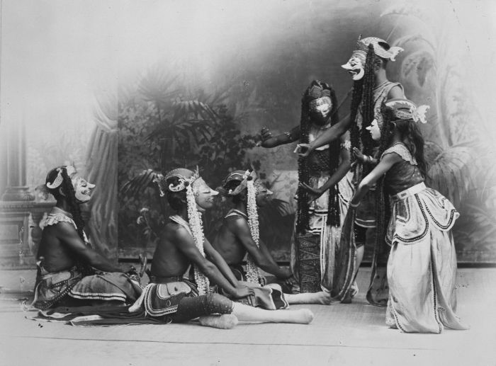 Foto. Studioportret van een groep wajang topeng spelers